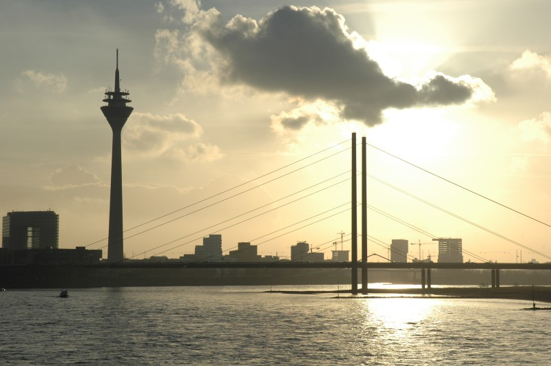 Düsseldorf, Rhein, Rheinkniebrücke, Rheinturm.